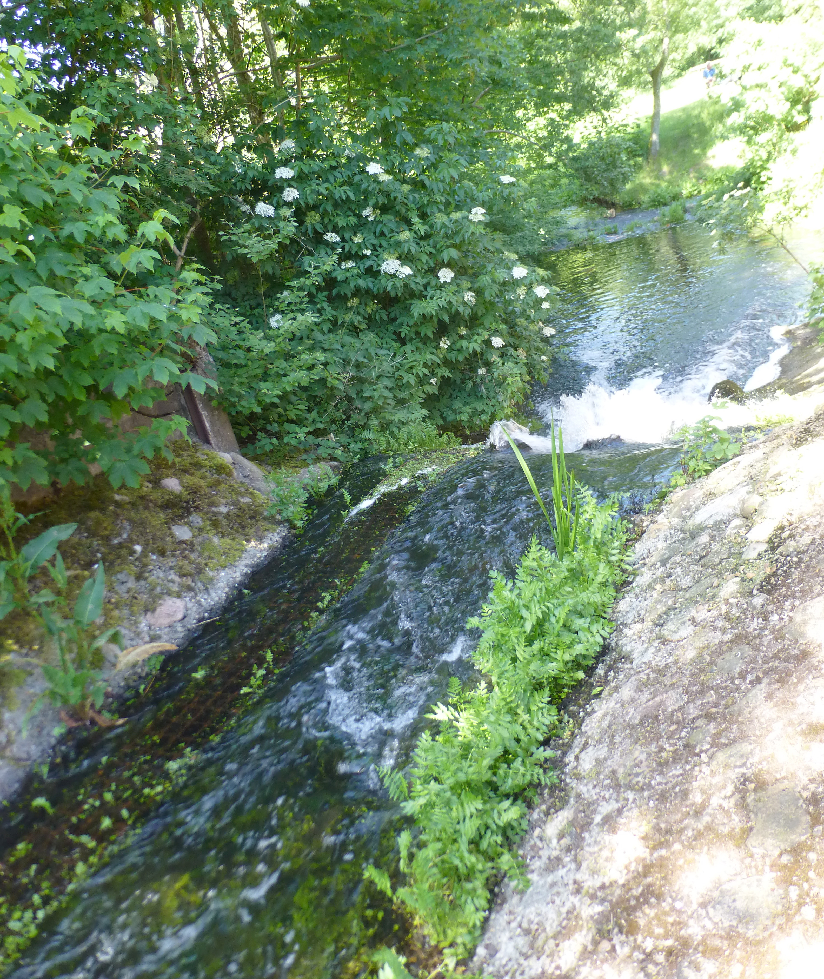 Lystup Å ved Lystrupminde